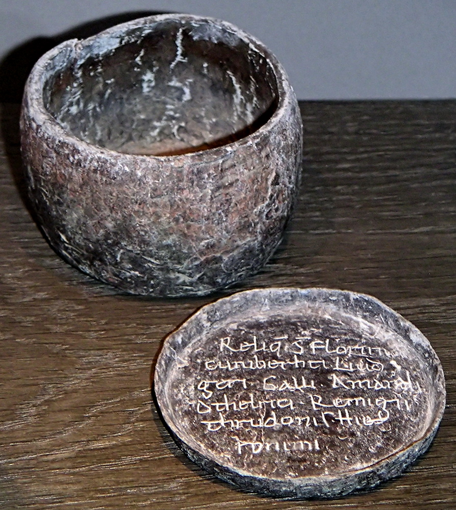 Reliquienbehälter aus früheren Altären des Essener Doms, eingemauert bei der Altarweihe 1054